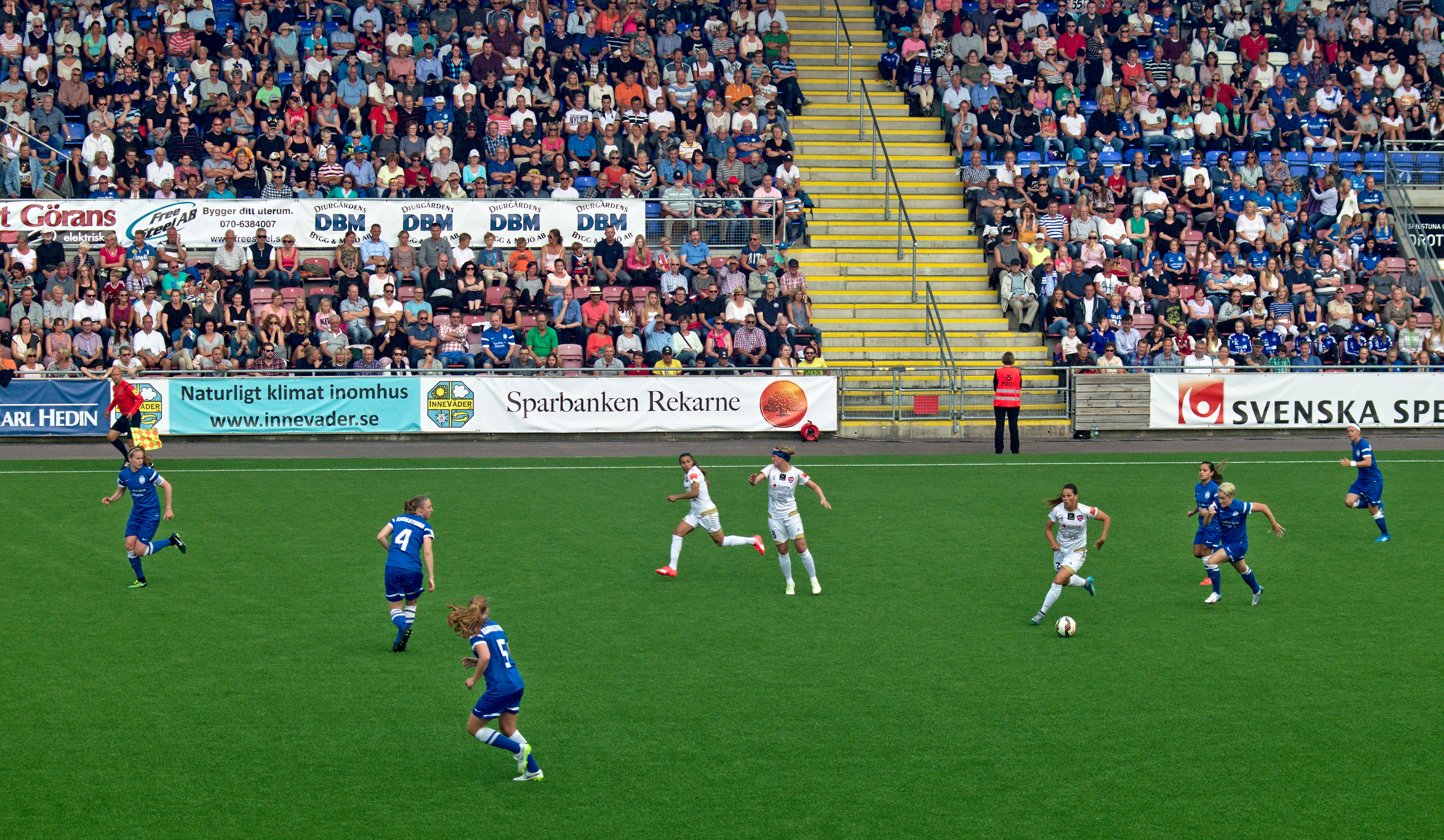 Eskilstuna United - FC Rosengård, Tunavallen i Eskilstuna 5 augusti 2015. Första halvlek.